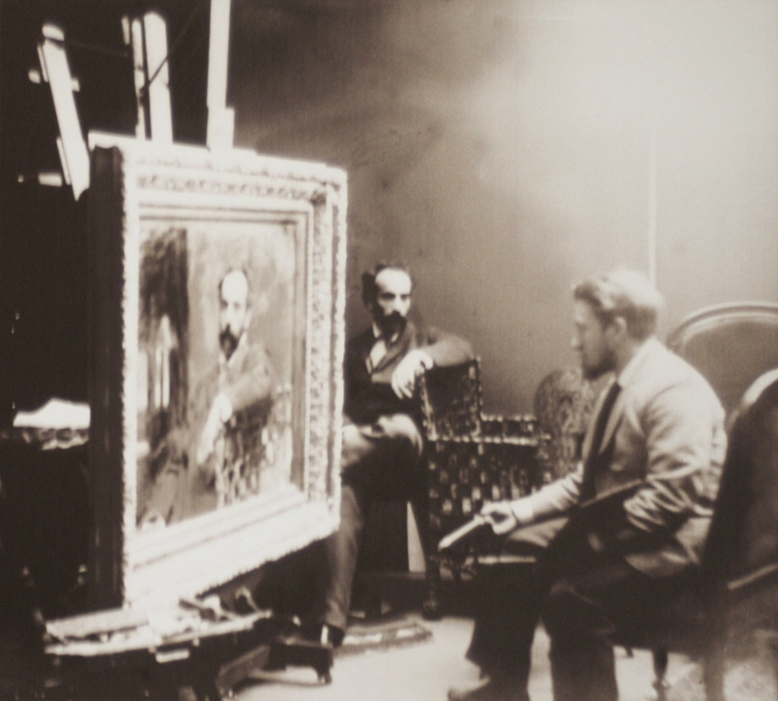 Валентин Серов пишет портрет Исаака Левитана в его доме-мастерской , где было создано много знаменитых полотен художника - "Вечер. Золотой Плес", "После дождя. Плес".